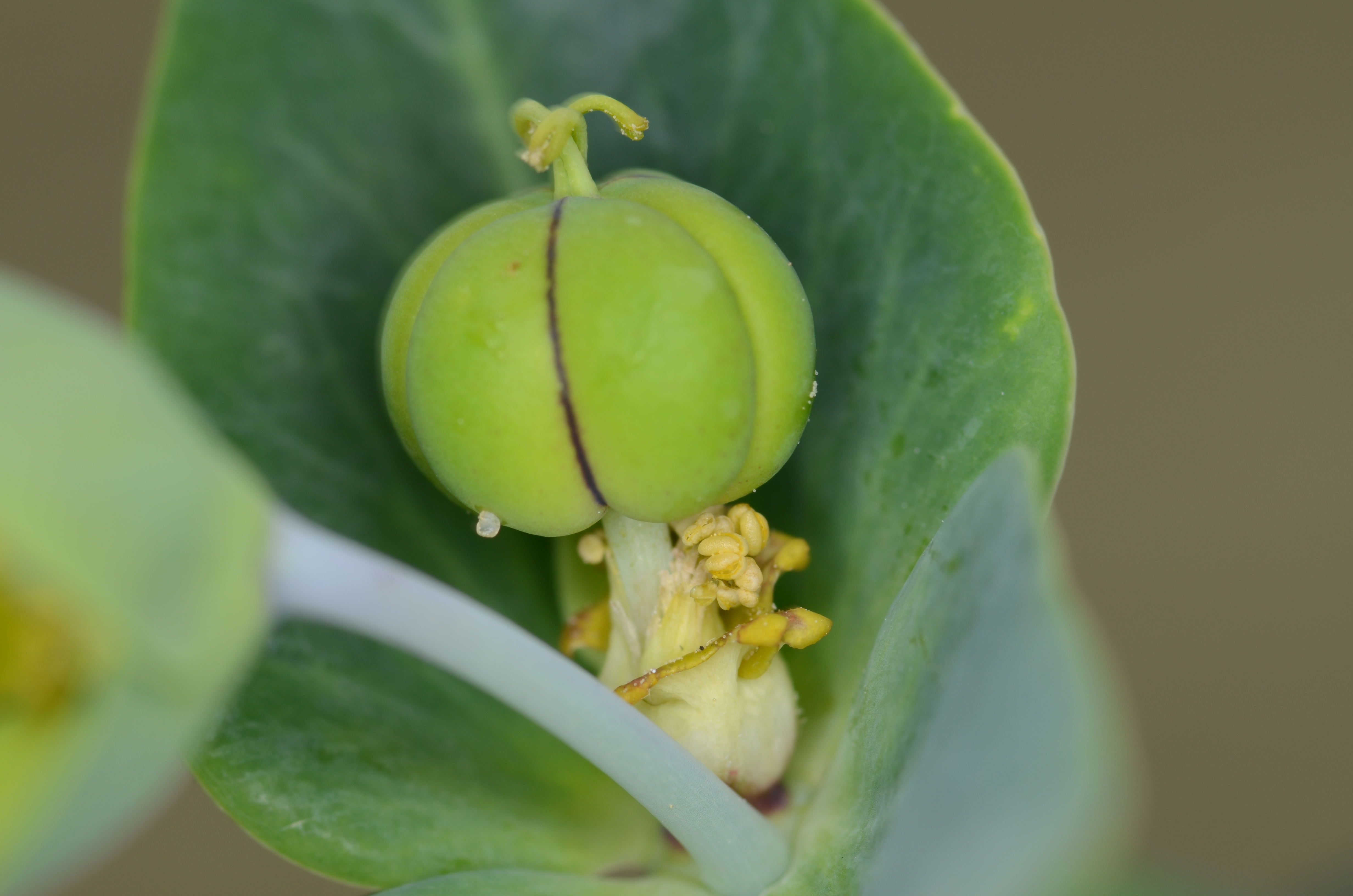 Euphorbia lathyris - Kreuzblättrige Wolfsmilch